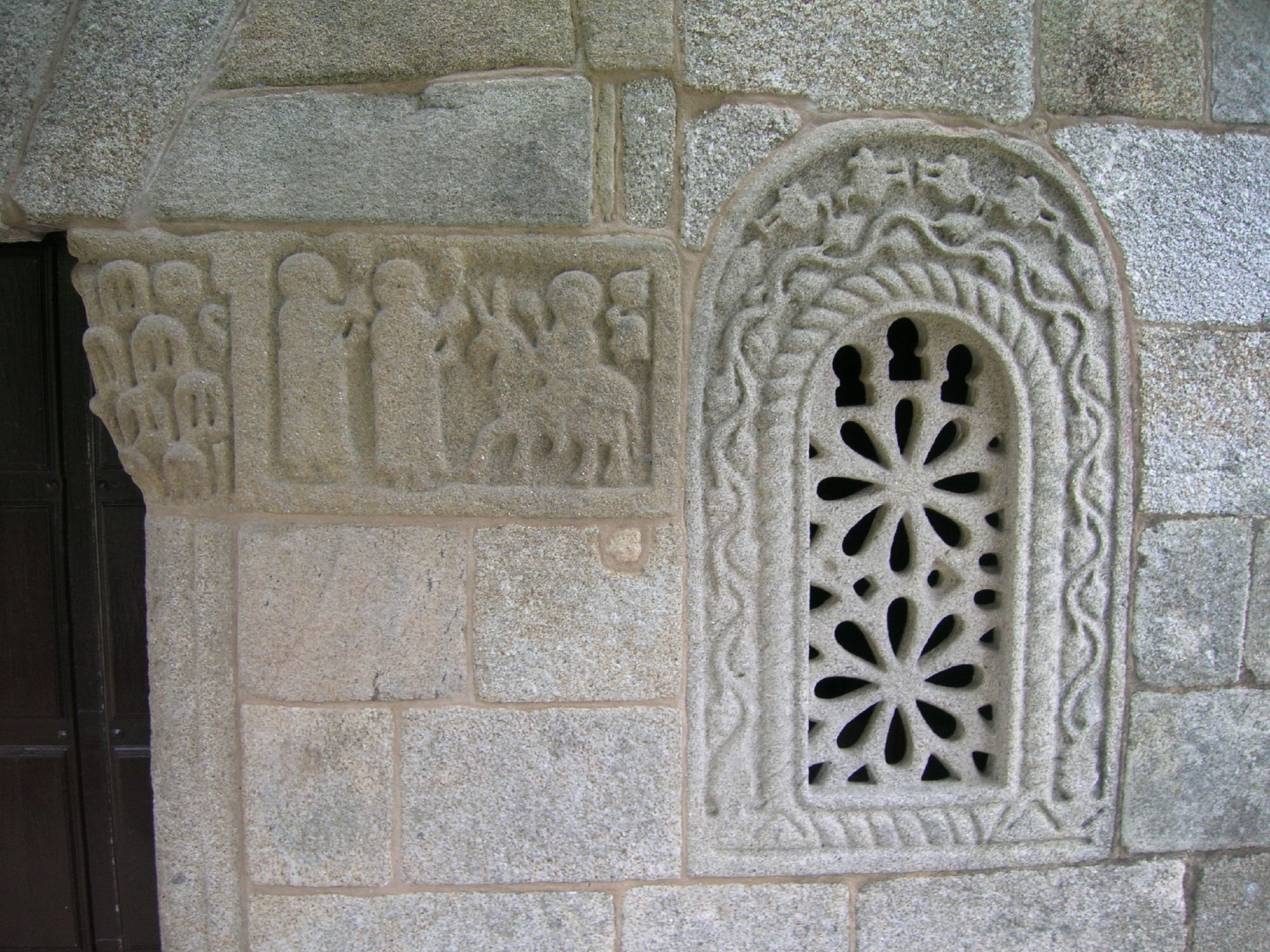 Detalle daw:gl:Capela de San Xés de Francelos